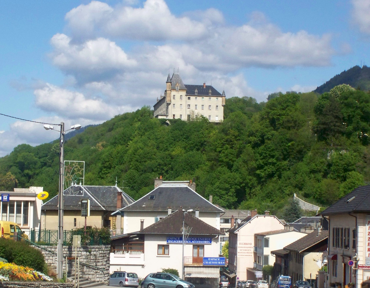 Commune, Ville de La Rochette en Savoie (France).